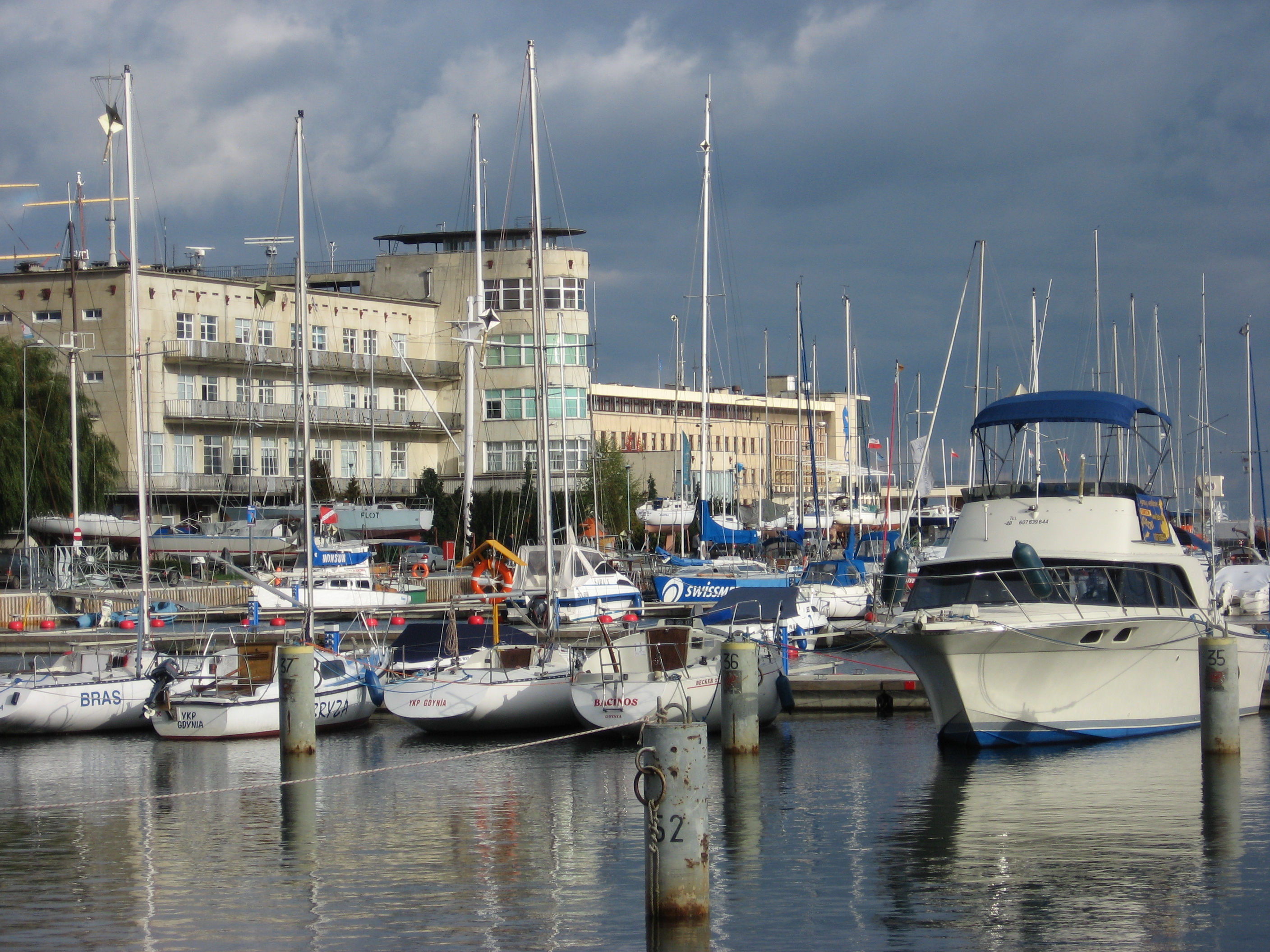 Marina in Gdynia / Przystań jachtowa (marina) w Gdyni. W tle charakterystyczny dla zabudowy okresu międzywojennego budynek wydziału Akademii Morskiej.